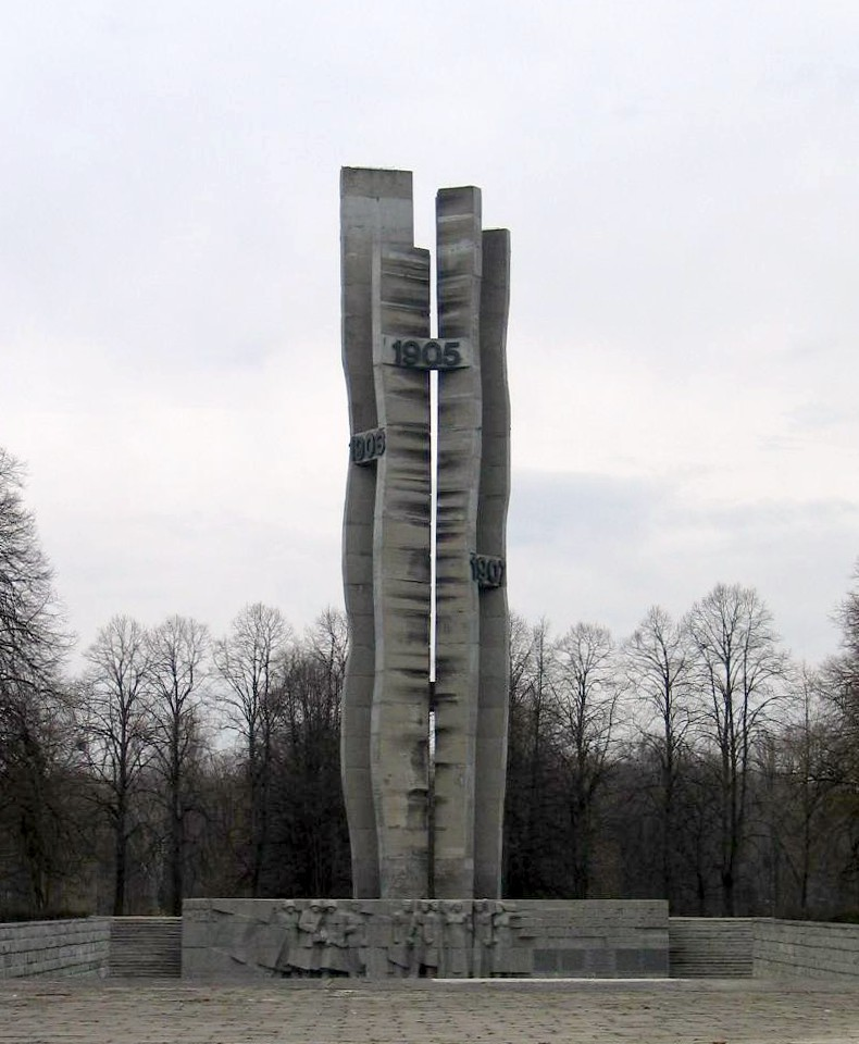 Pomnik Rewolucji 1905r w Łodzi